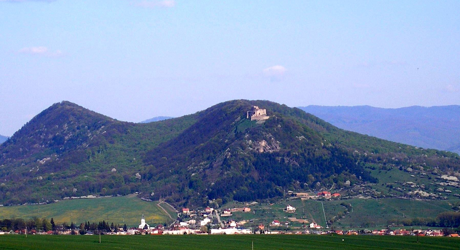 Obec Kapušany okres Prešov región Šariš. Nad obcou je hradný vrch so zrúcaninou Kapušianskeho hradu.